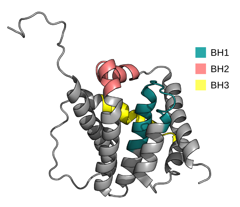 Просторова модель проапоптичного білка Bax